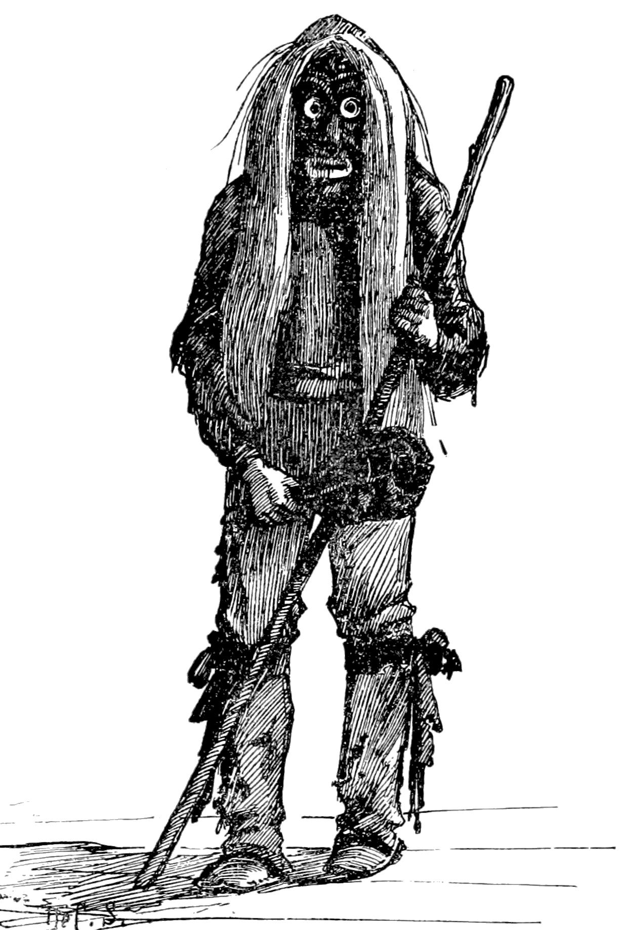 An Iroquois dancer in costume